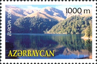 Marka üzərində Azərbaycanın gözəl güşəsi olan - Göygöl təsvir olunub. Marka turizm mövzusuna həsr edilib.